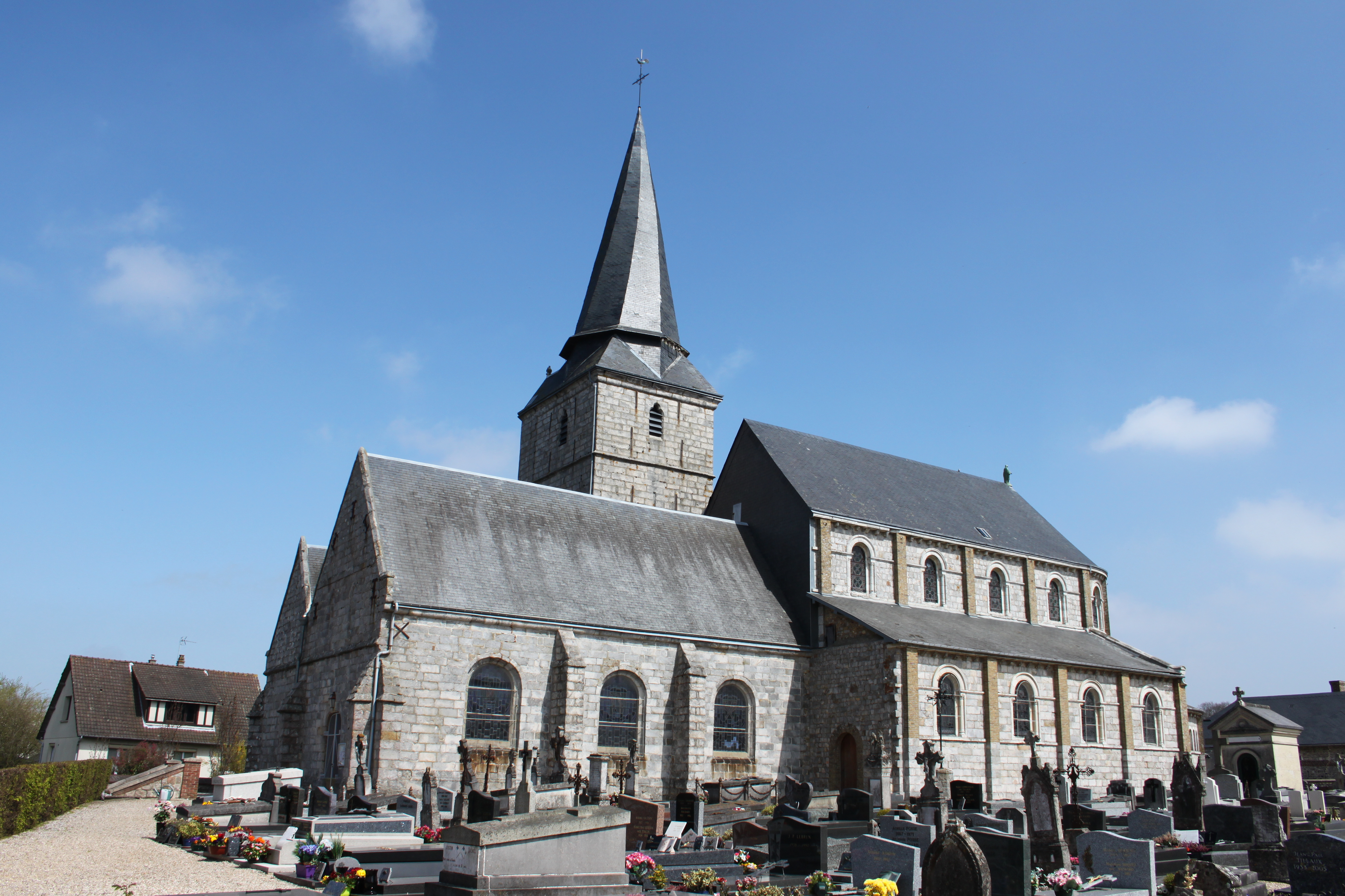 Église Saint-Martin d'Angiens, Seine-Maritime.